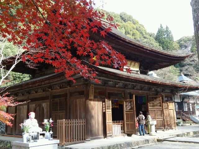 定光寺 本堂